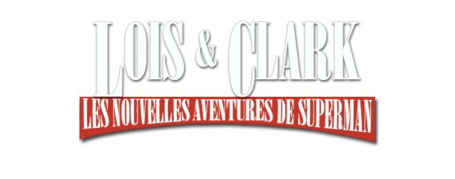 Logo de la série télévisée Loïs et Clark